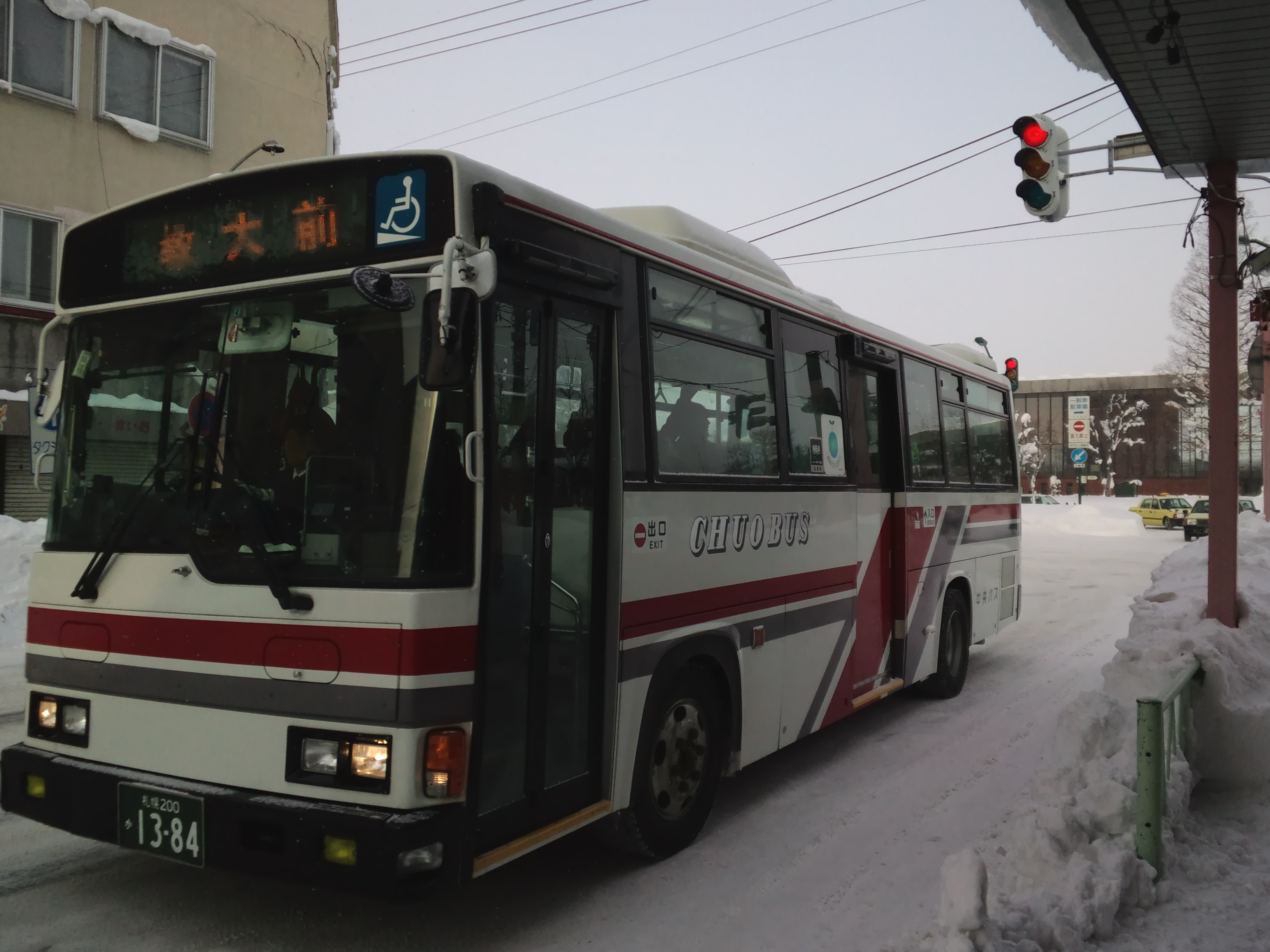 北海道中央バスかえで団地線（北海道教育大学岩見沢校スクール便）